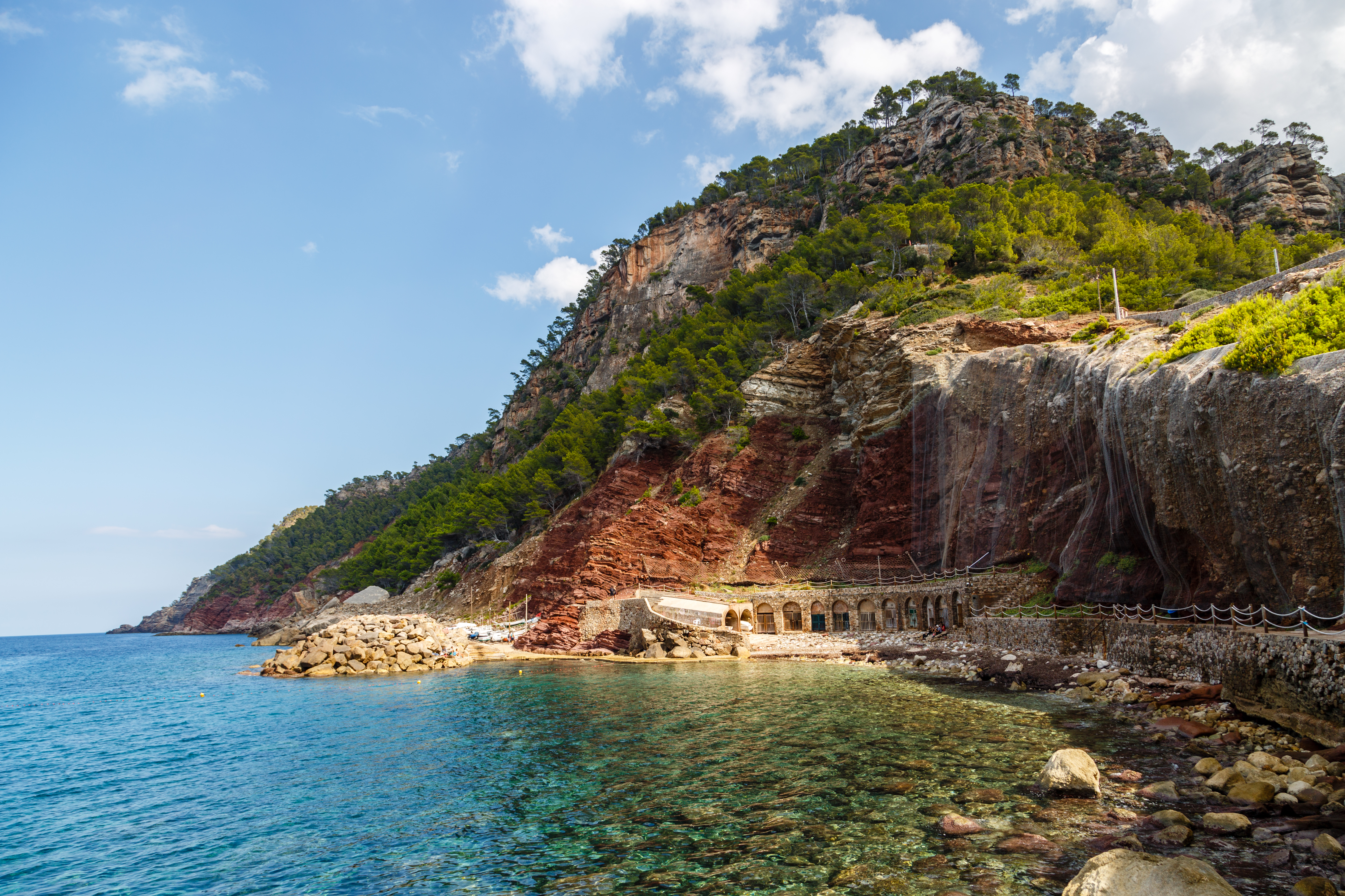 Carretera al Mar, Blick auf den Strand rechts und den Bootsanleger